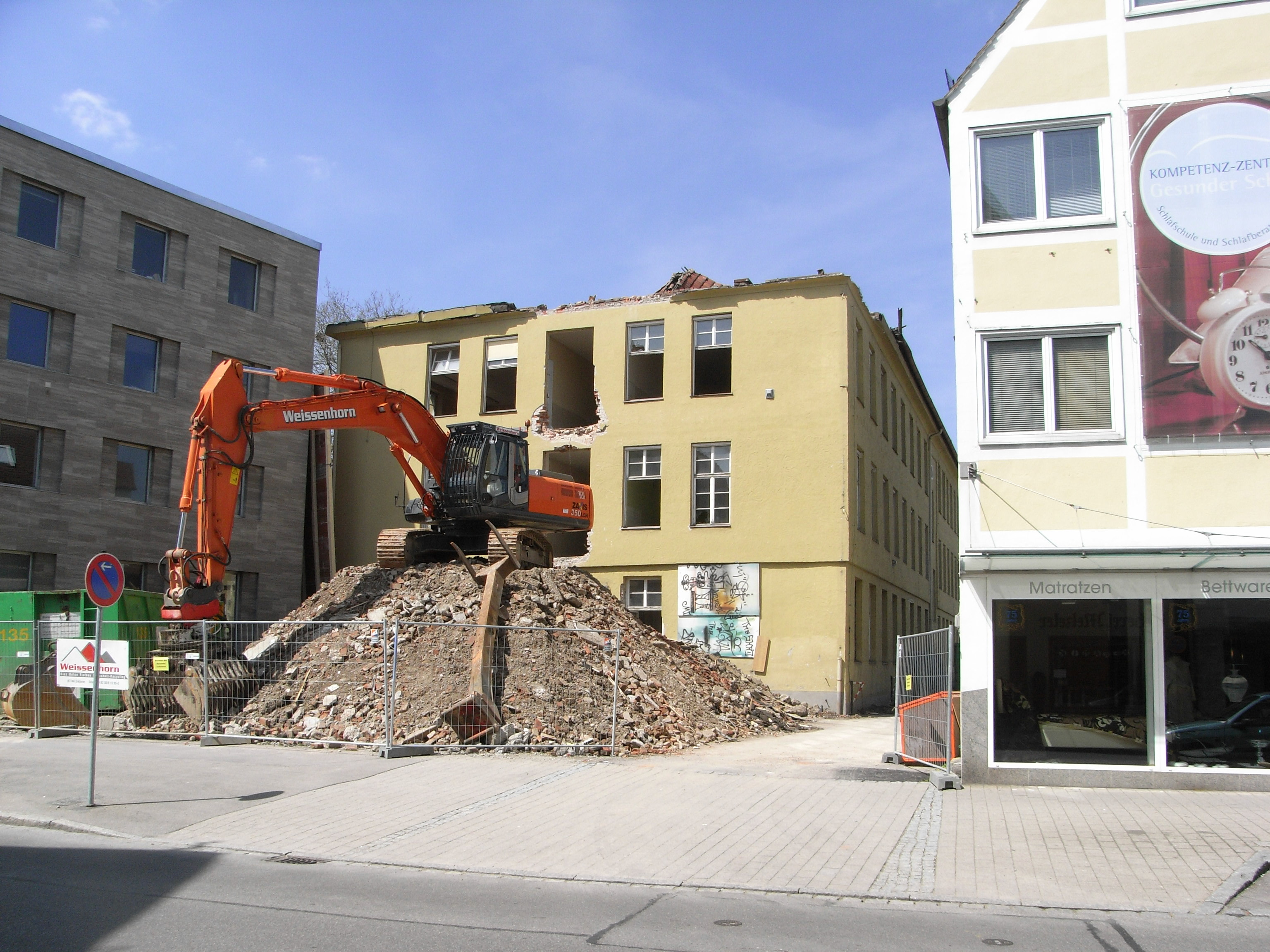 Das Elsbethenkloster wird abgerissen. An dieser Stelle soll ein Einzelhandels- und Dienstleistungskomplex sowie Gebäude für das Landestheater Schwaben bis 2010 entstehen